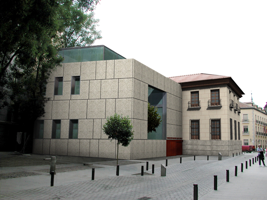 Fachada principal de la Biblioteca Iván de Vargas